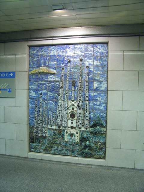 Mosaic in the Sagrada Família metro station, Barcelona/Mosaic en l'estació Sagrada Família del metro de Barcelona